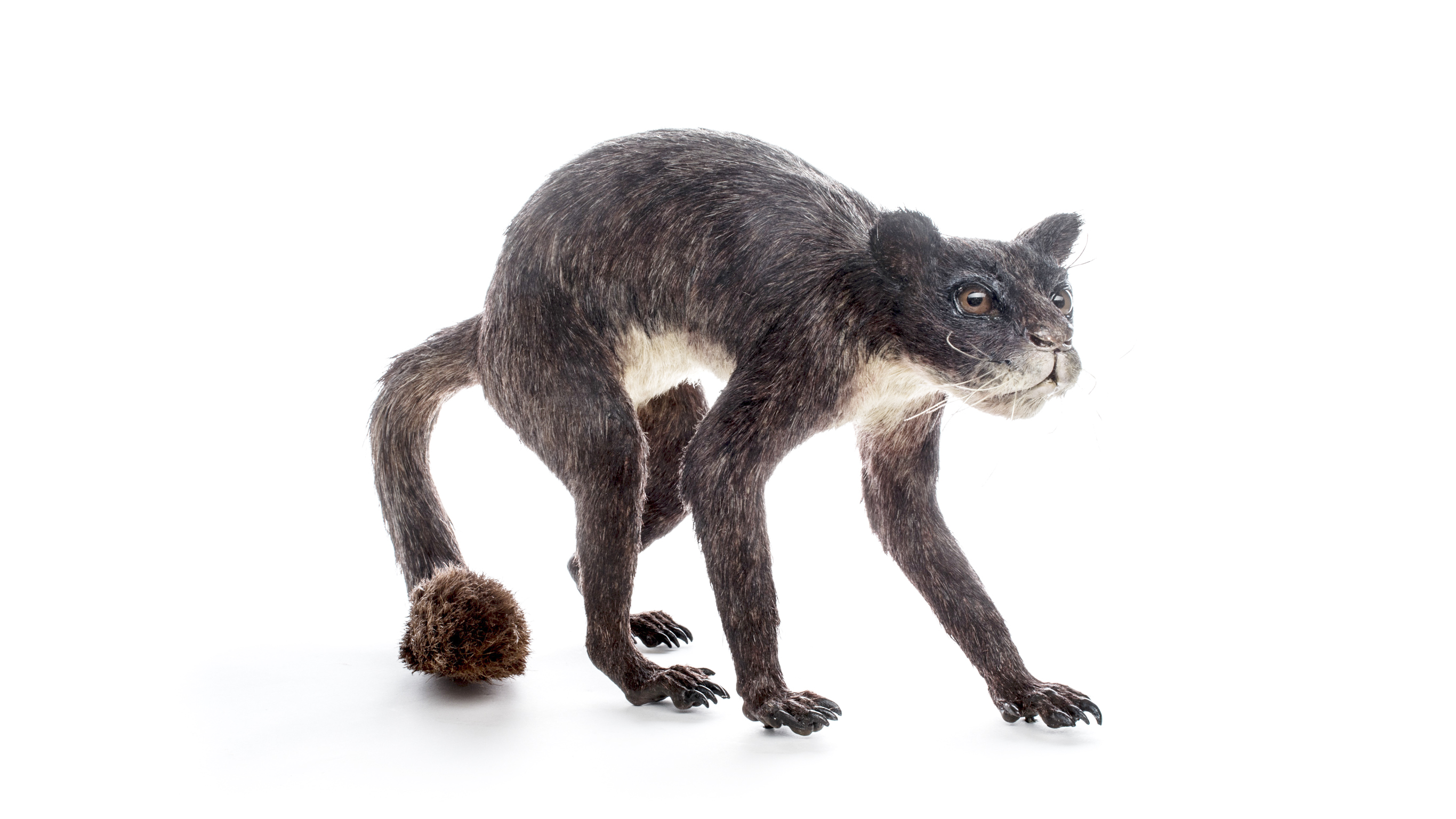 Ricostruzione in scala 1:1